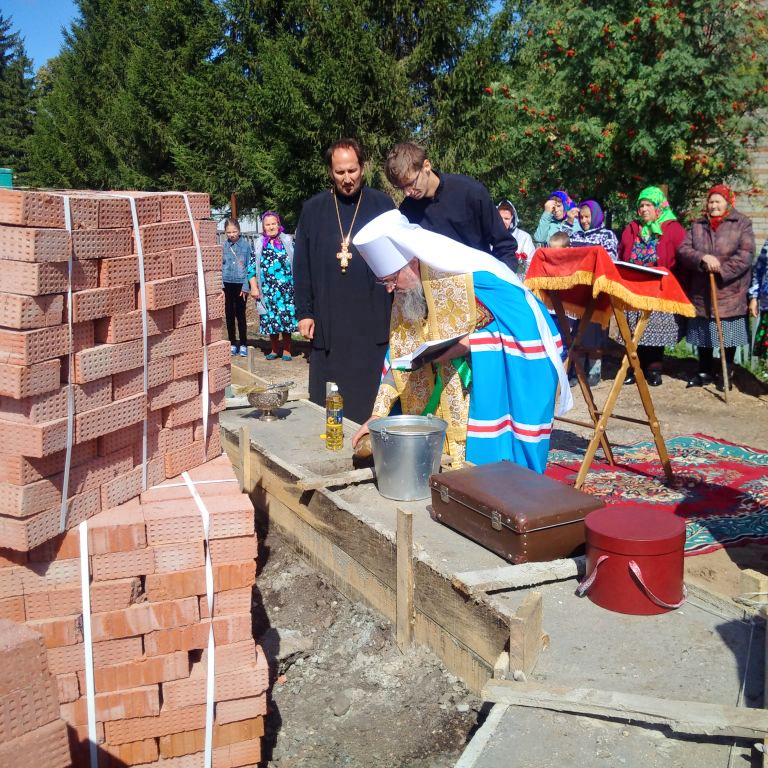 митрополит Уфимский и Стерлитамакский Никон совершил закладку камня в основание храма в честь святых бессребреников и чудотворцев Косьмы и Дамиана в селе Красный Зилим